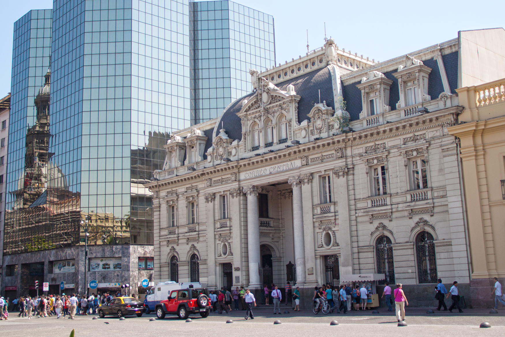 Santiago, Chile